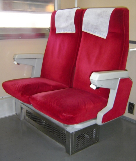 国鉄113系電車グリーン車の簡易リクライニングシート（JR化後の2006年撮影）